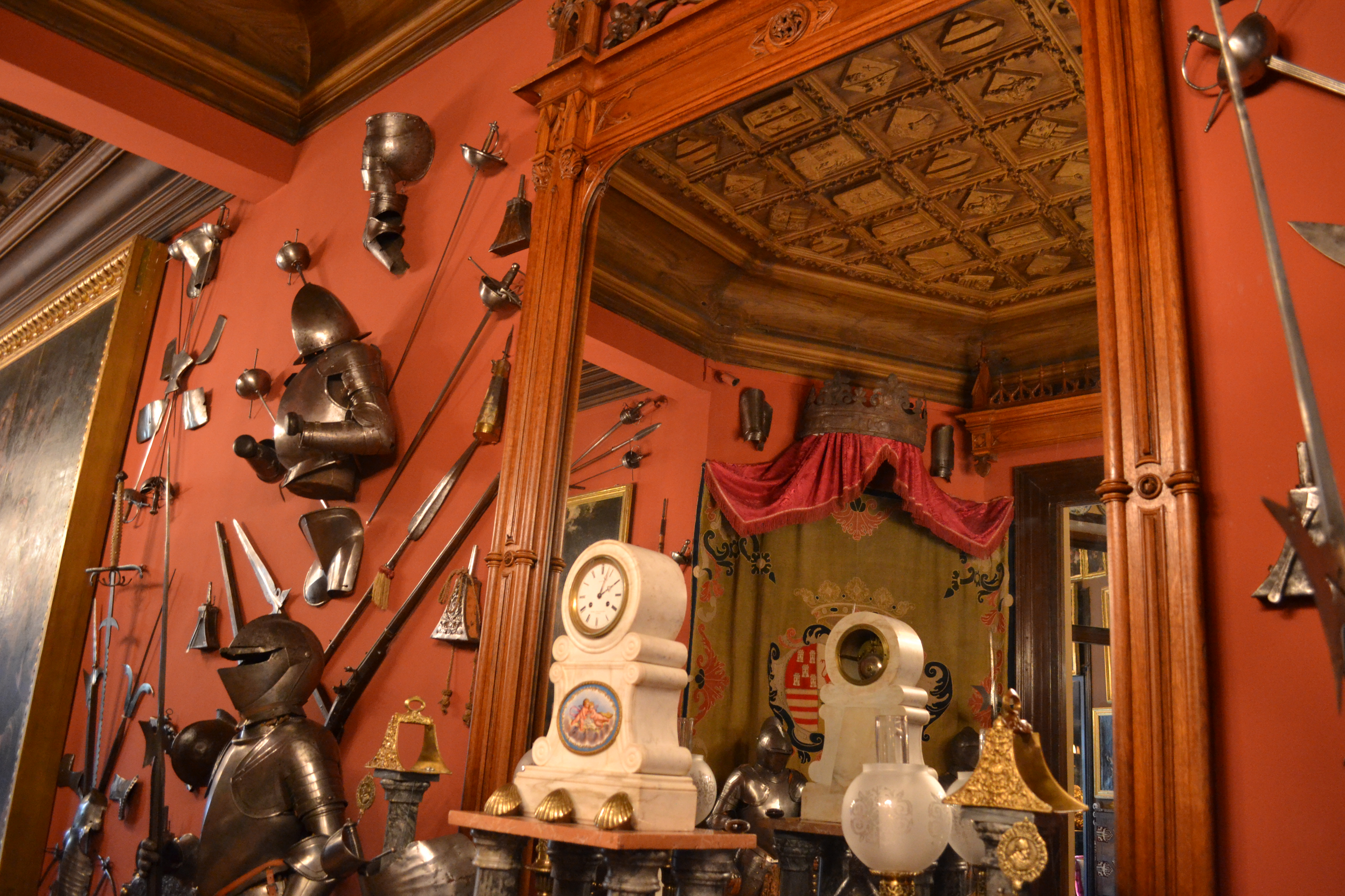 Armería del Museo Cerralbo, Madrid.